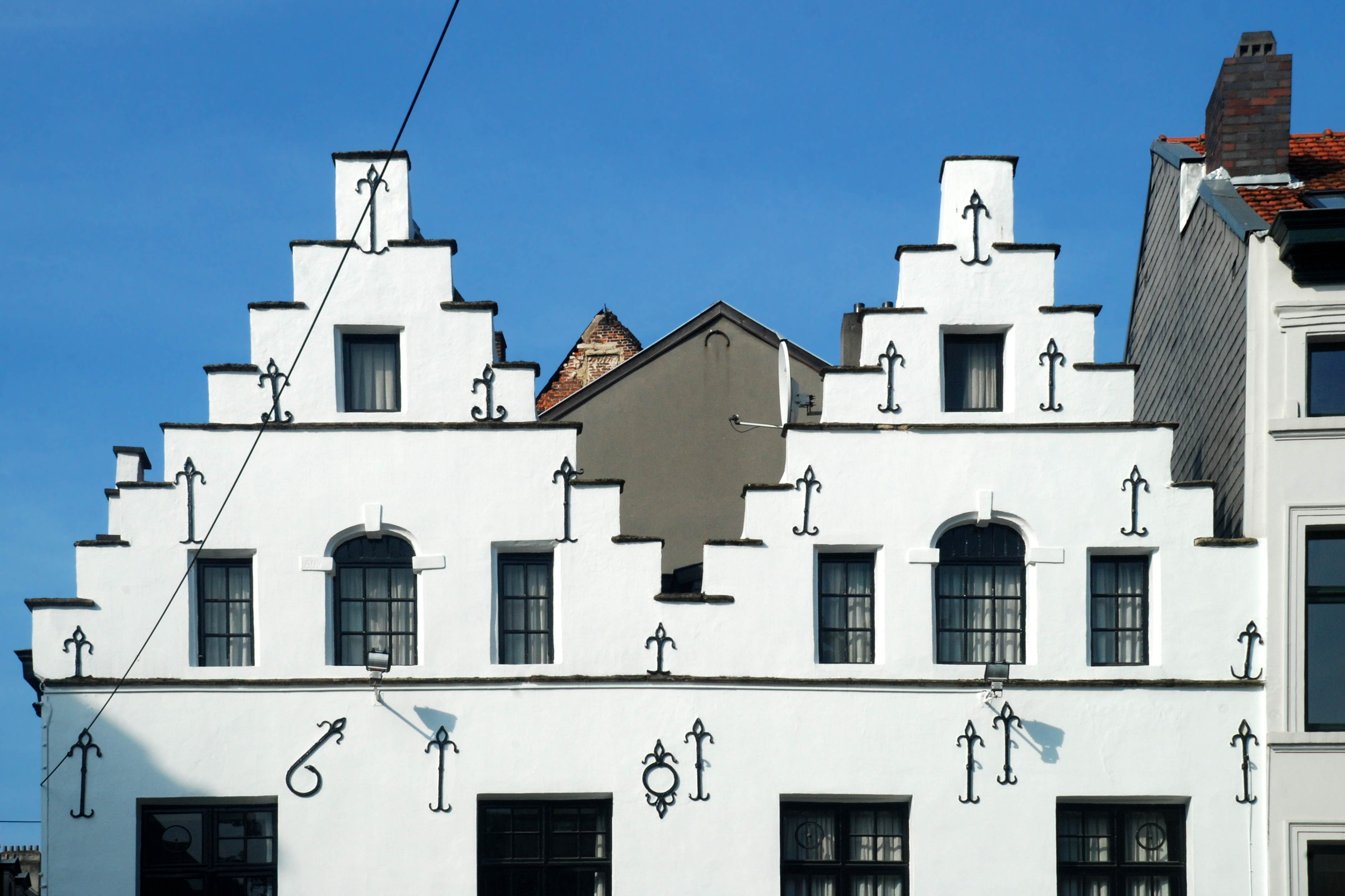 Belgique - Bruxelles - Petit Sablon - Auberge du Roy d'Espagne